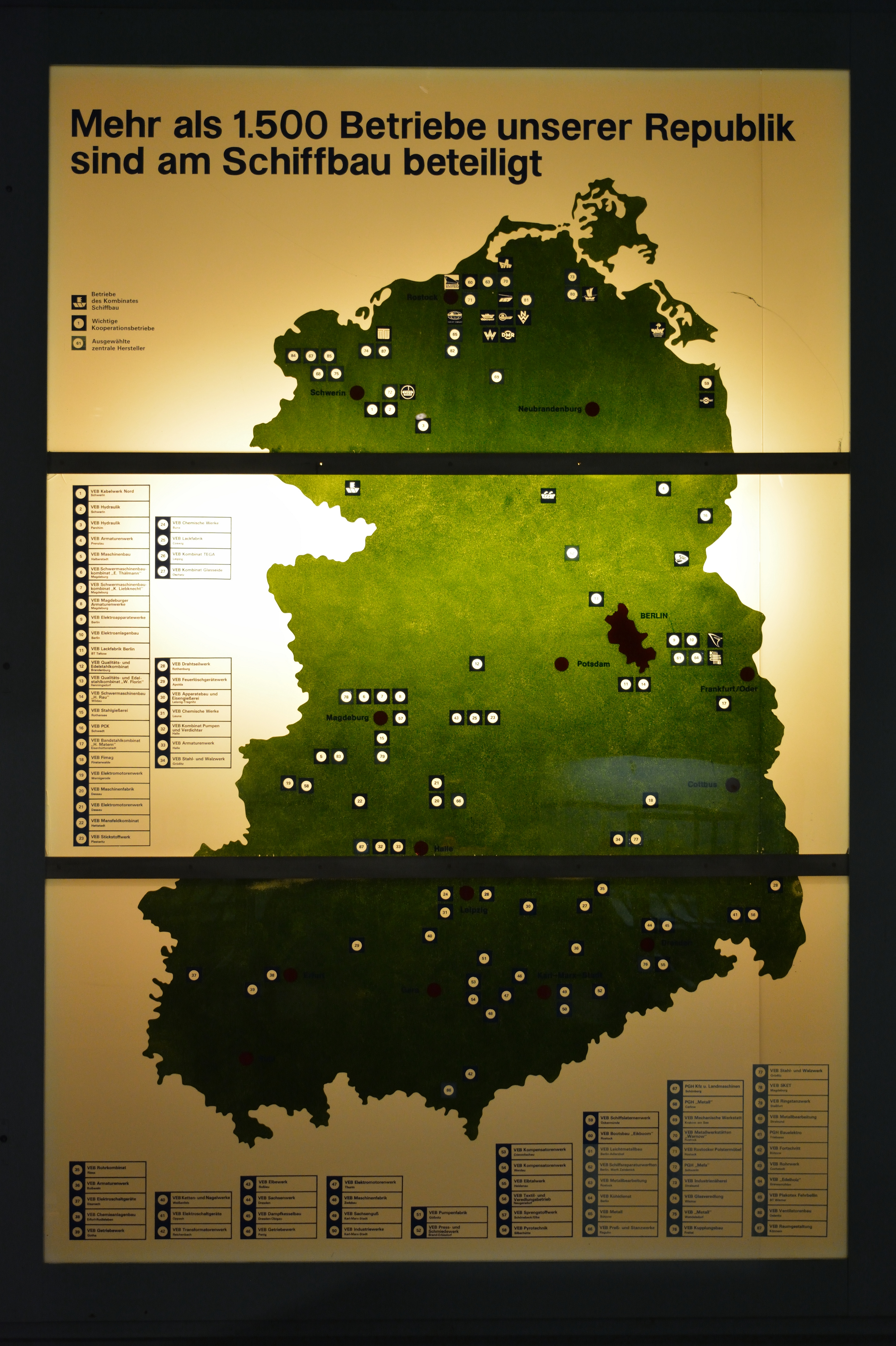 Ein Besuch auf dem Museumsschiff "Dresden" in Rostock im August 2019